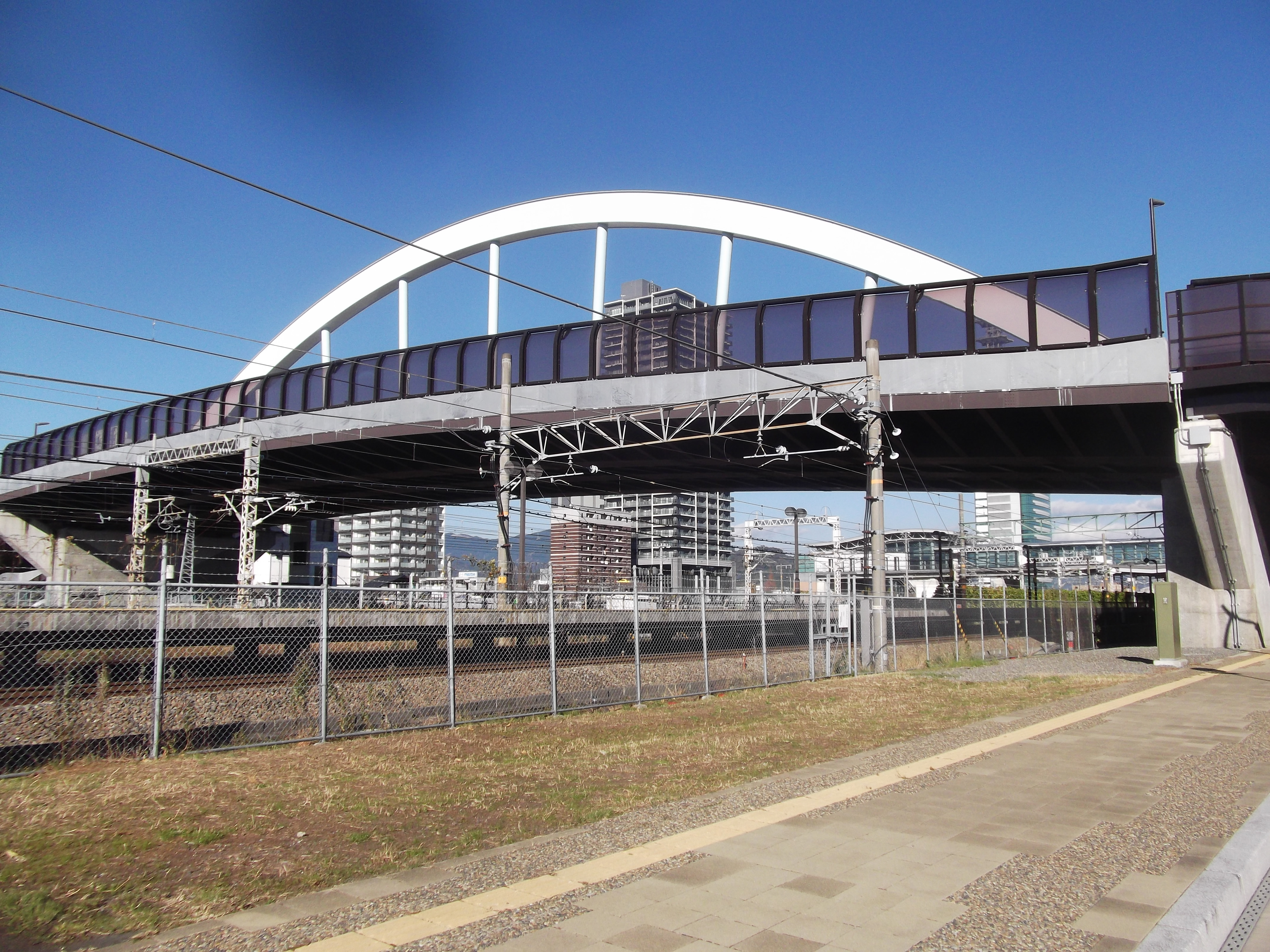 東静岡大橋